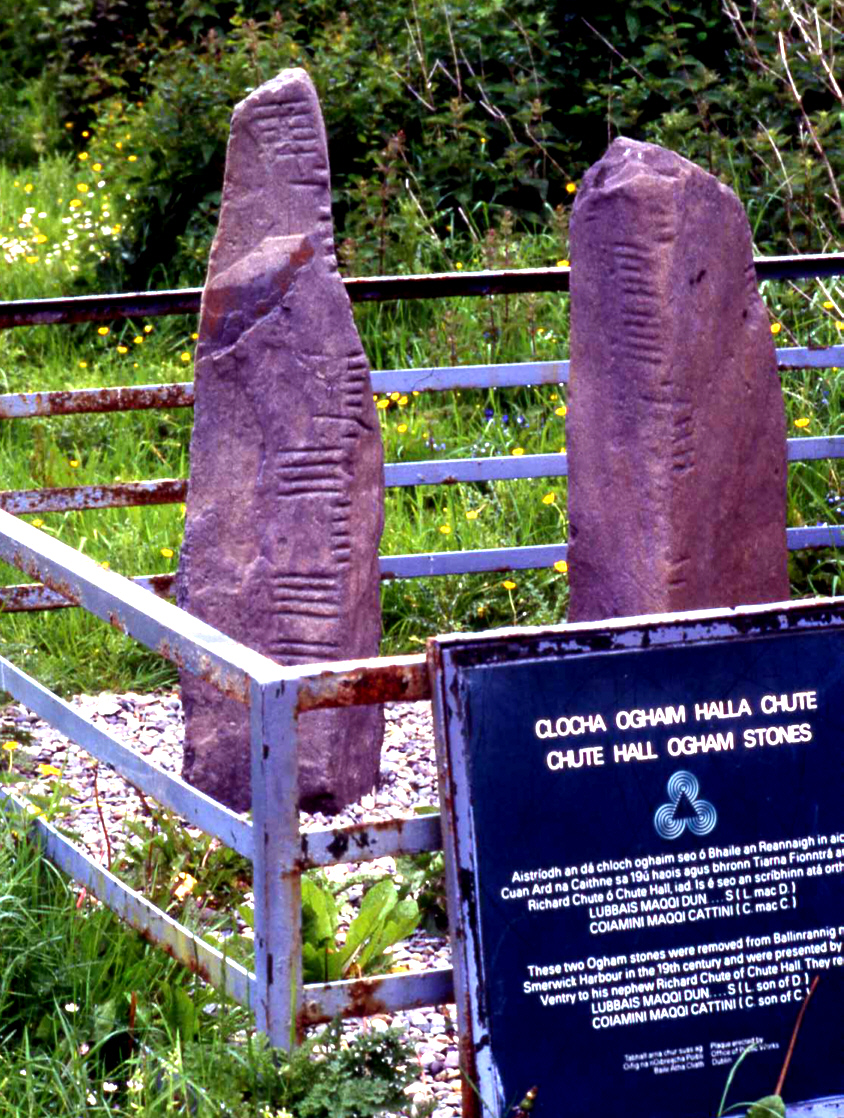 Ogham